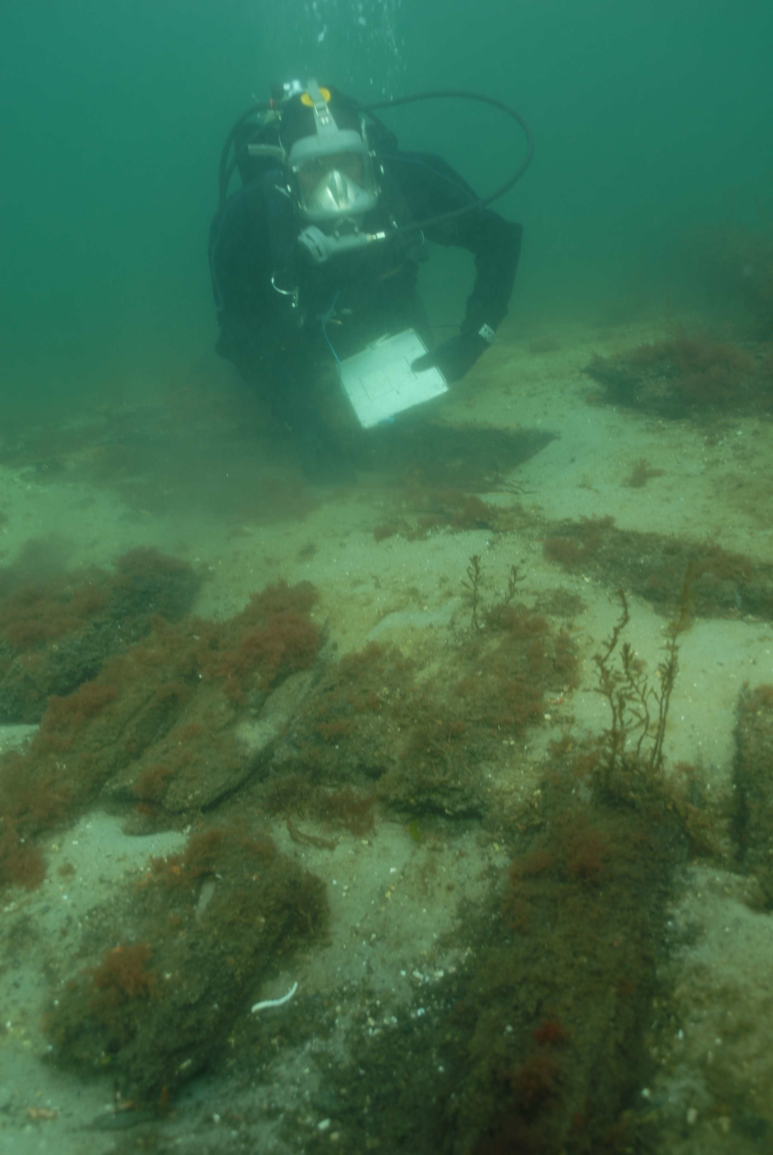 Marinarkeolog jobber på vrak i Flekkefjord